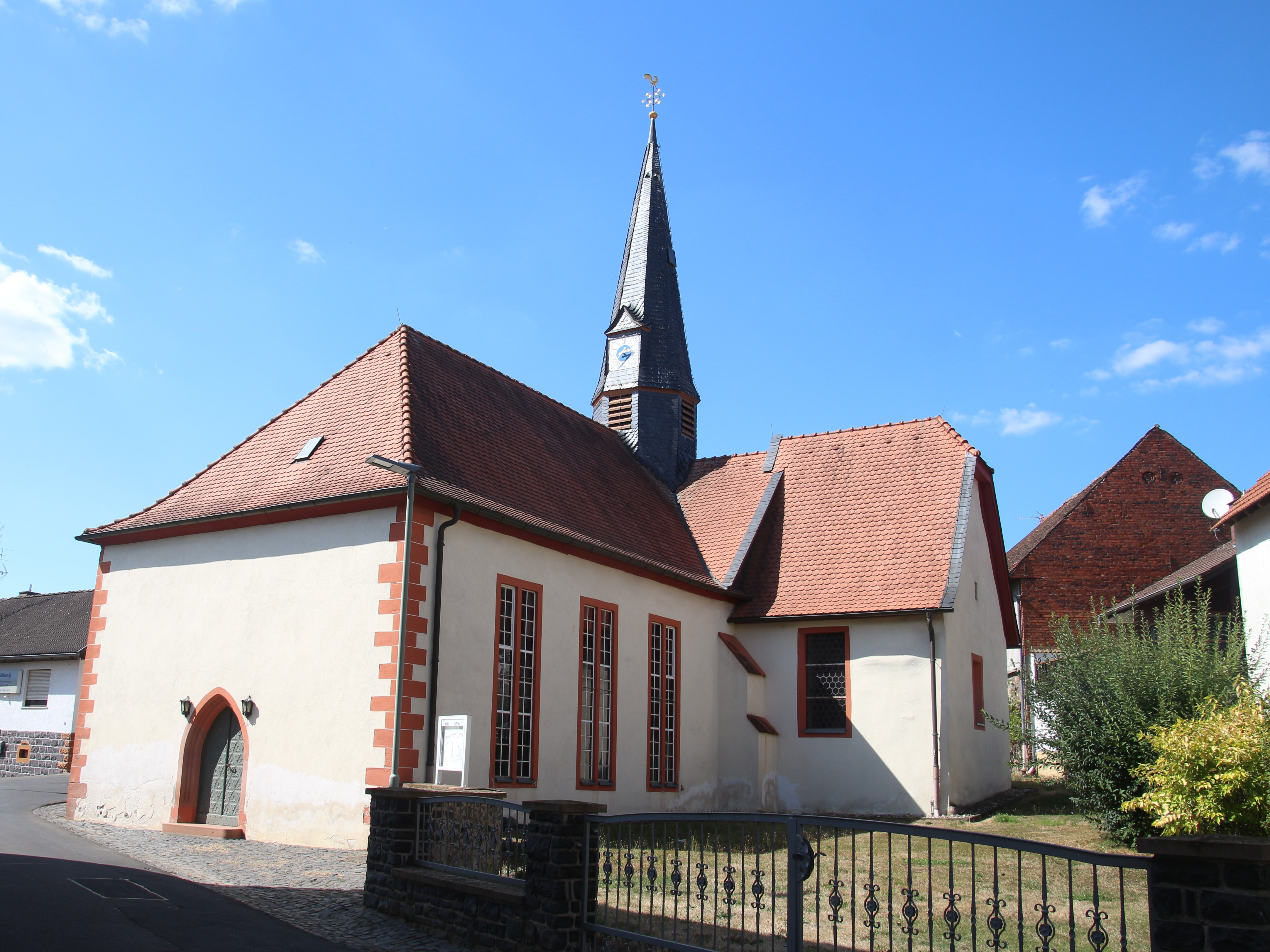 Evangelische Kirche Fauerbach, Gemeinde Nidda, Wetteraukreis, Hessen